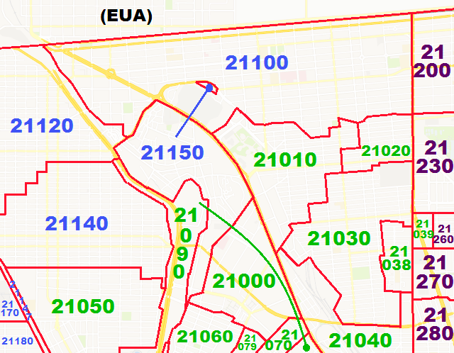 Códigos postales de las zonas céntricas de Mexicali, Baja California, para propósitos de ilustración